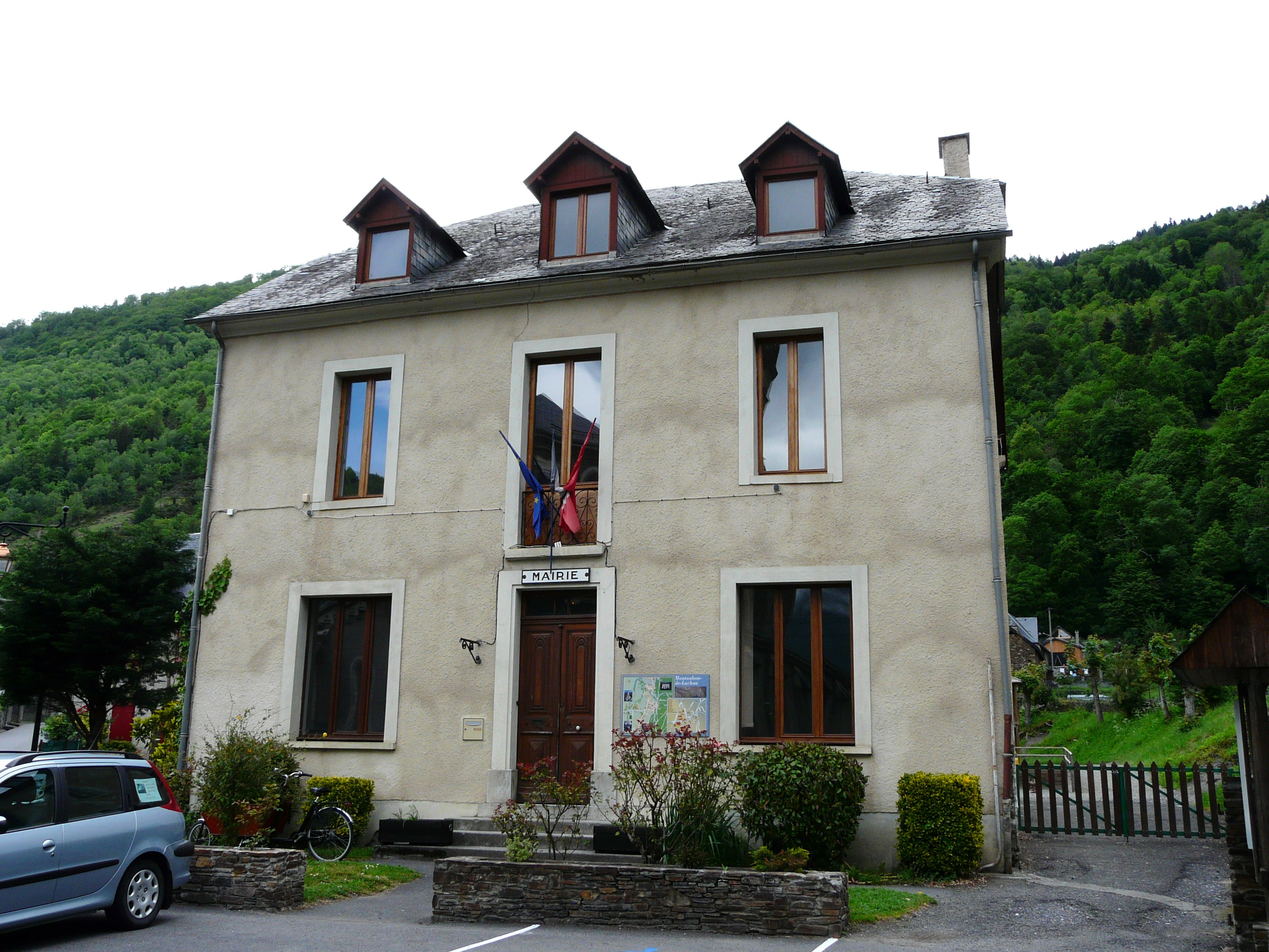 La mairie de Montauban-de-Luchon, Haute-Garonne, France.